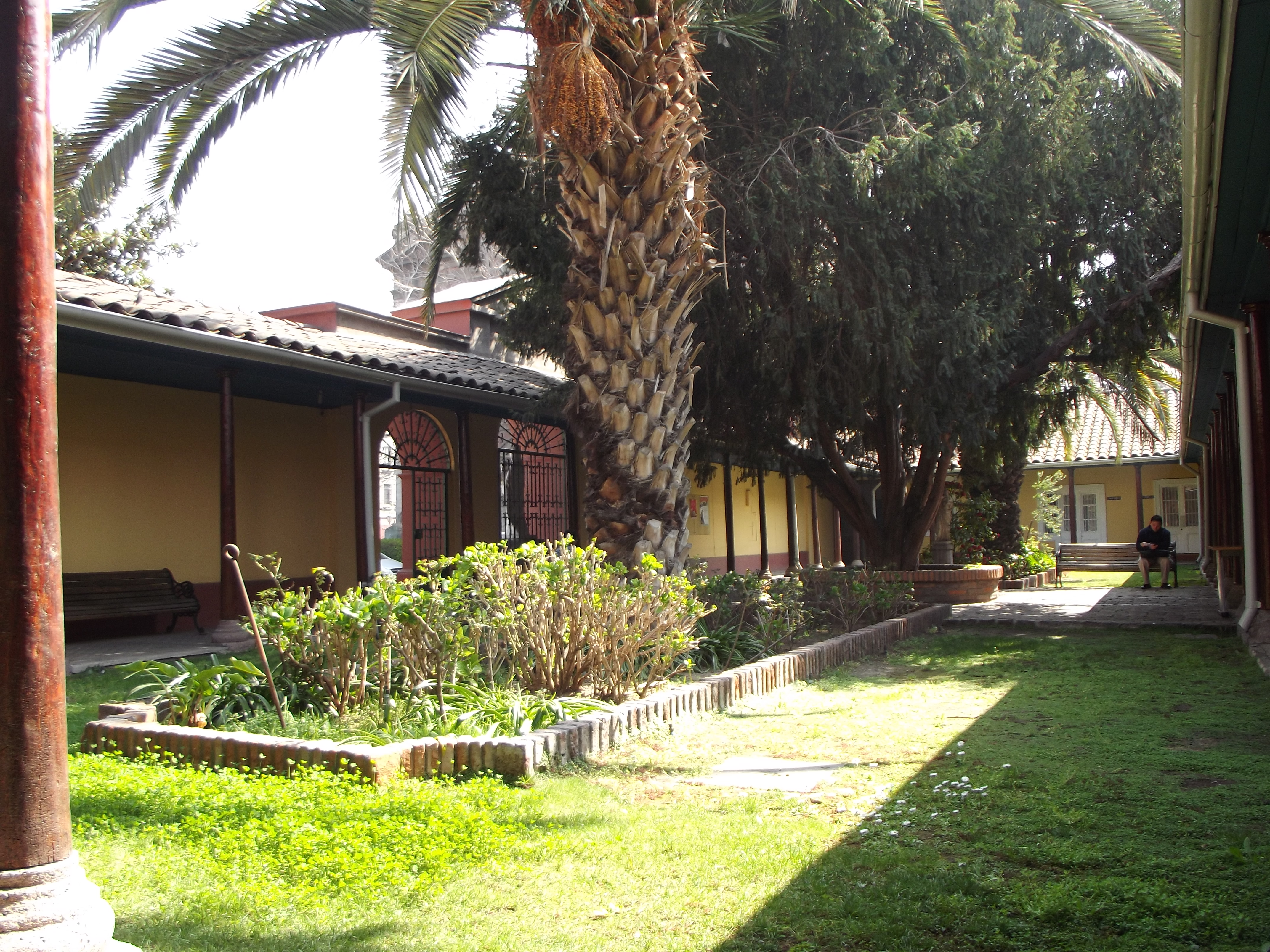 Actual Vicaría Zona Norte, Arzobispado de Santiago. This is a photo of a national monument in Chile: 858